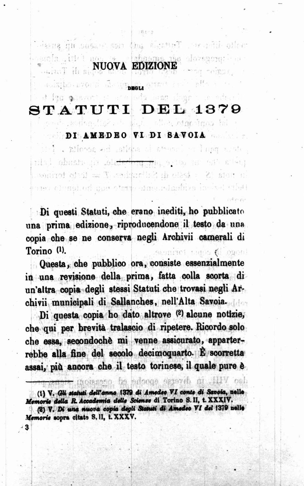 pagina 251